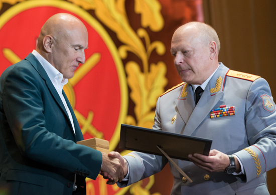 Композитор Игорь Матвиенко и Главнокомандующий Сухопутными войсками Российской Федерации генерал-полковник Олег Салюков во время презентации гимна Сухопутных войск Российской Федерации «Вперед, пехота!»